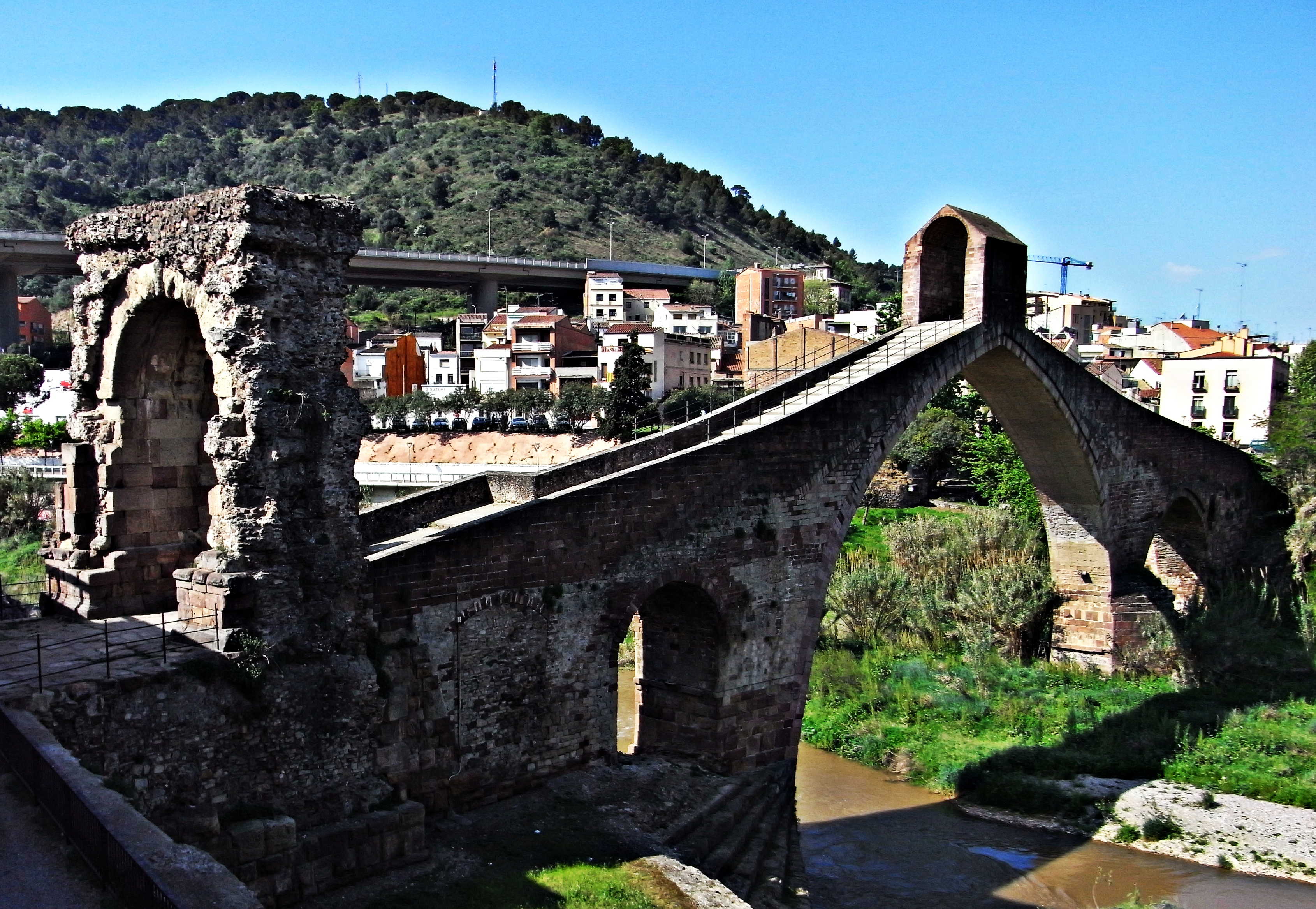 Pont romà (Martorell i Castellbisbal)